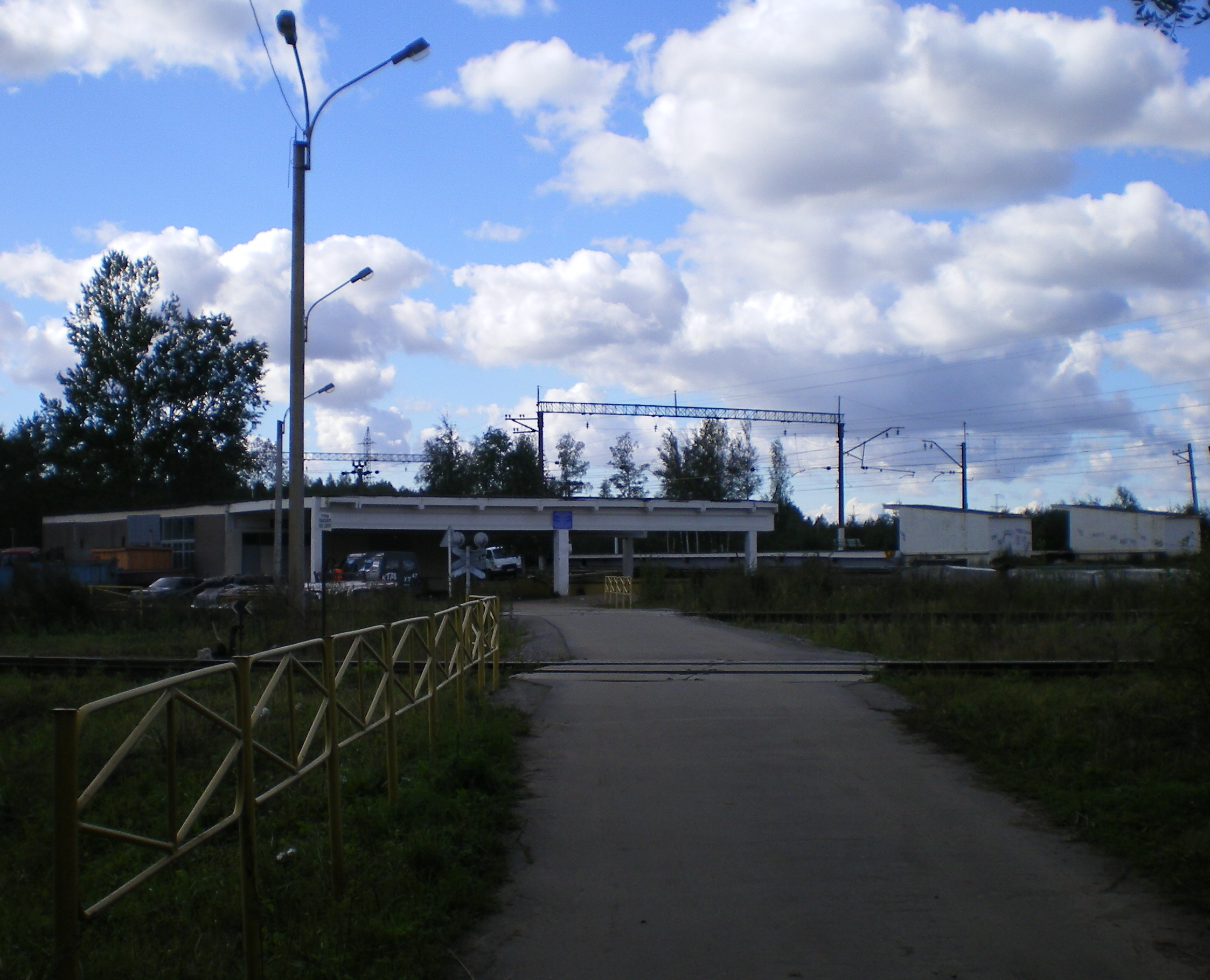 Все постройки станции: касса, платформы и подземные переходы.